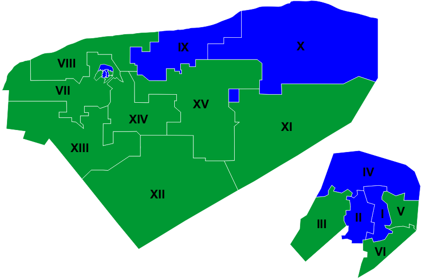 Distribución por partido politico de las diputaciones del estado de Yucatán, México